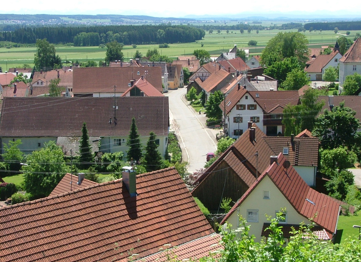 Osterberg